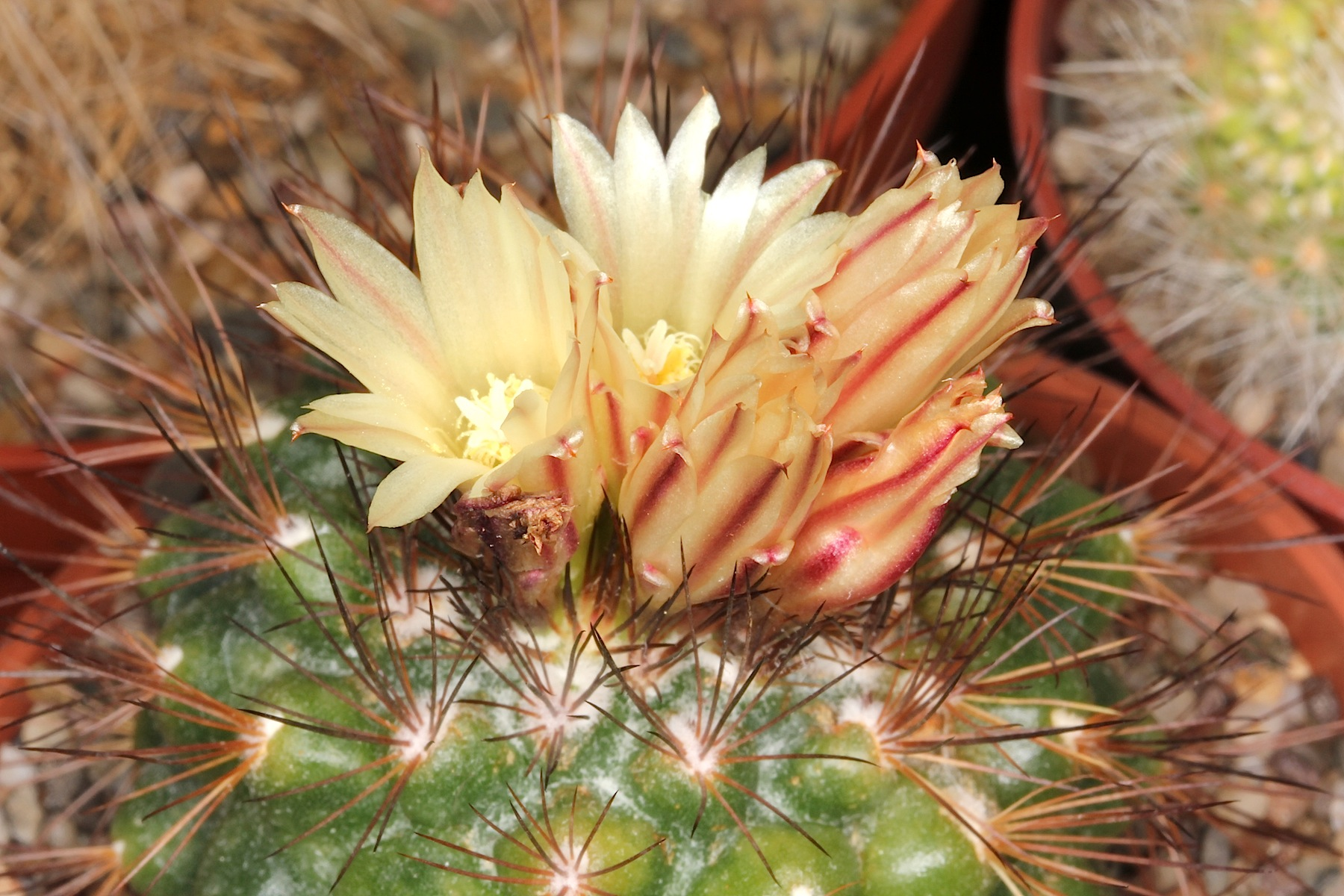 Acharagma aguirreanum